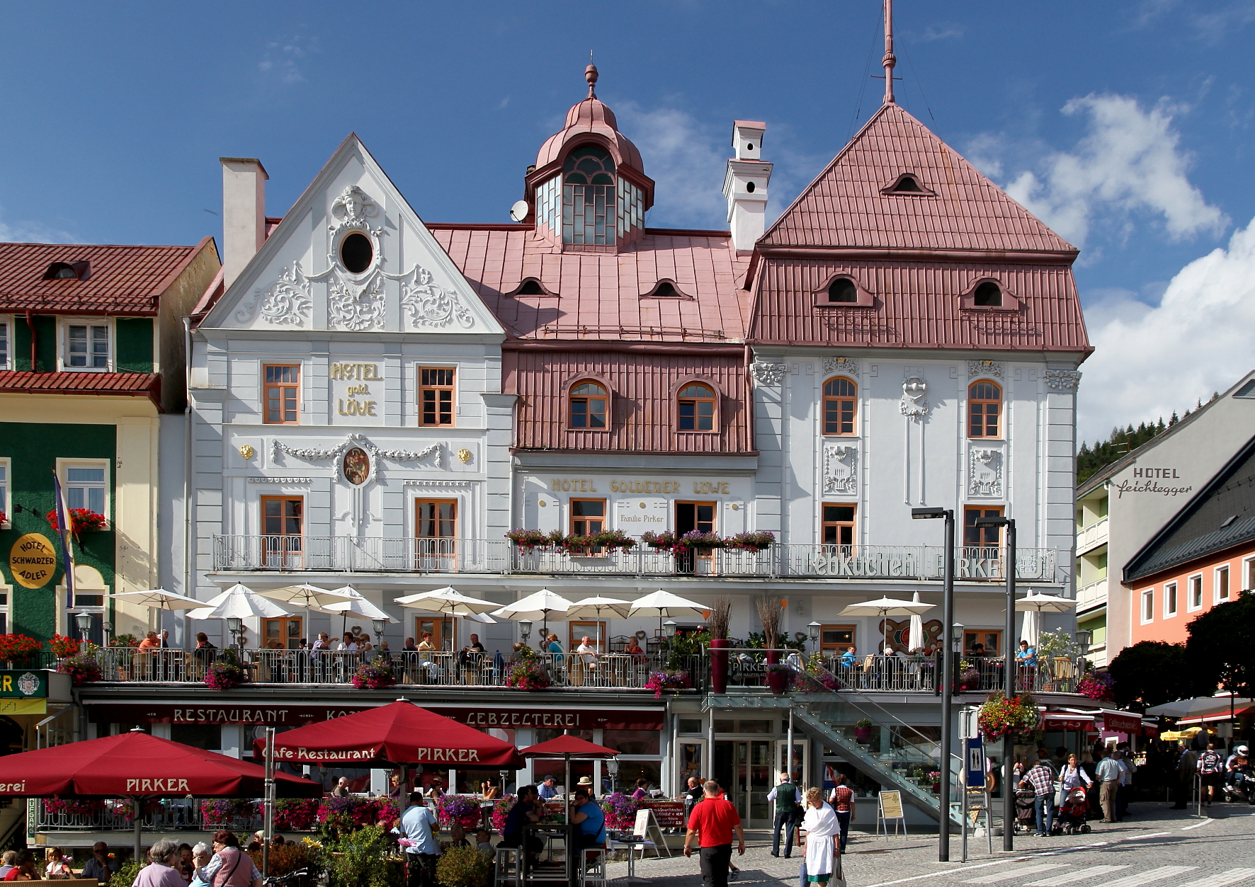 Das denkmalgeschützte Hotel Goldener Löwe am Hauptplatz in der obersteirischen Stadt Mariazell.